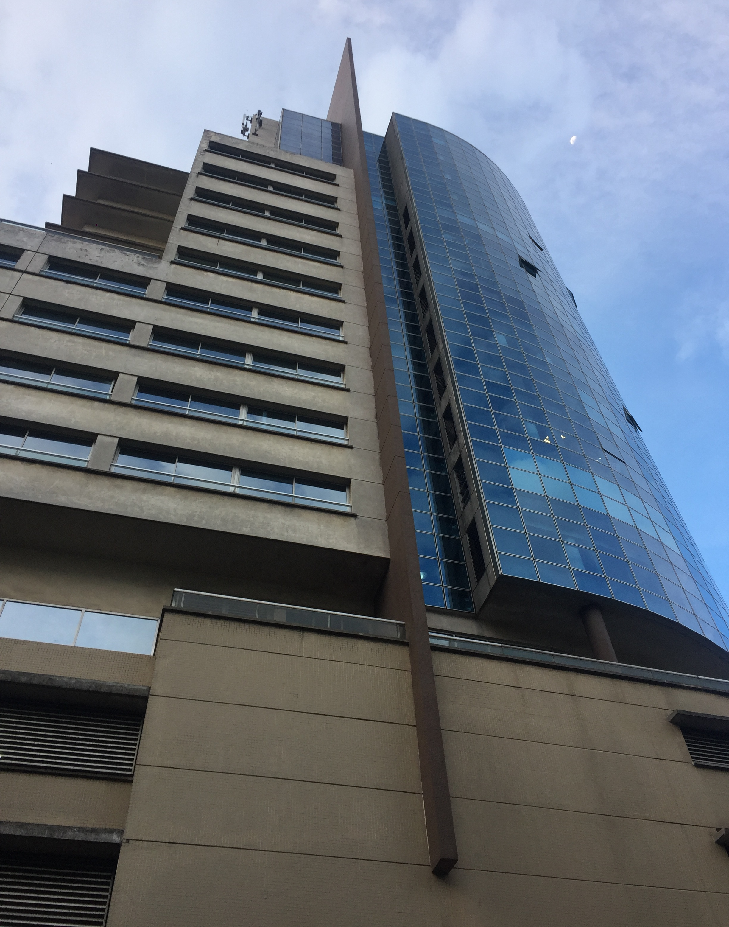 Vista parcial de la Torre de los Profesionales en Montevideo, Uruguay.